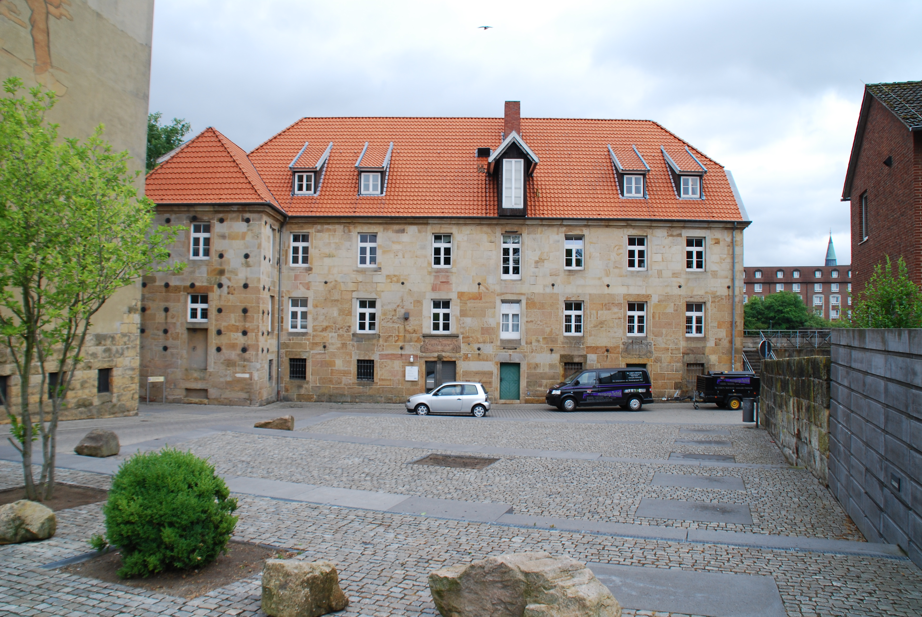 Emsmühle in Rheine This image shows a heritage building in Germany, located in the North Rhine-Westphalian city Rheine (no. 064).